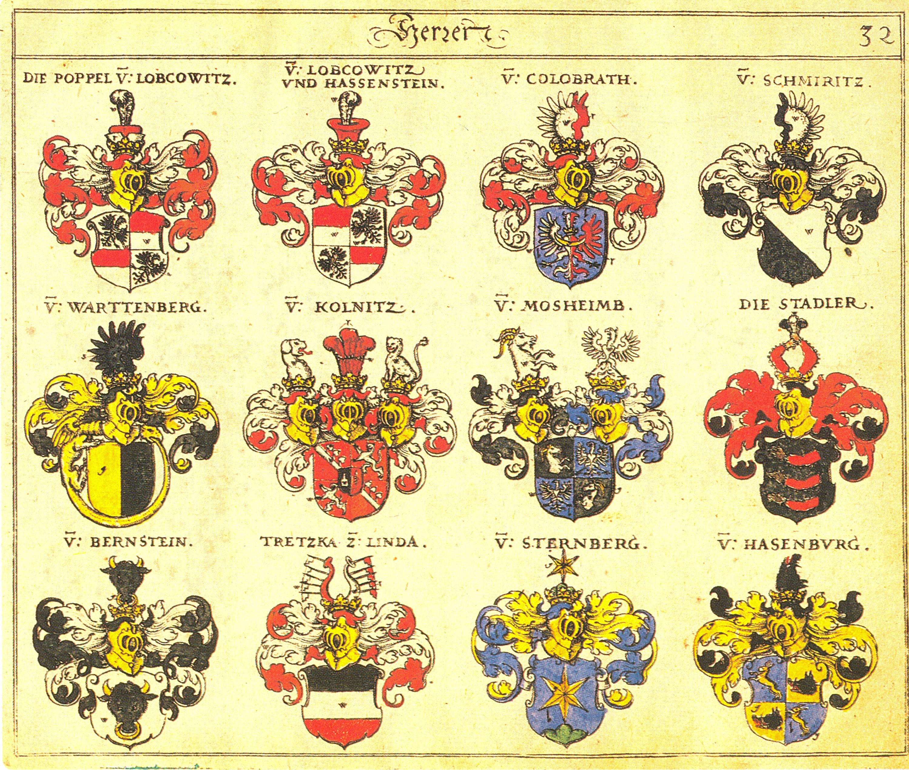 Johann Siebmacher: New Wappenbuch eingescannt aus: Horst Appuhn (Hrsg.), Johann Siebmachers Wappenbuch. Die bibliophilen Taschenbücher 538, 2. verb. Aufl , Dortmund 1989 Herren Blatt 32